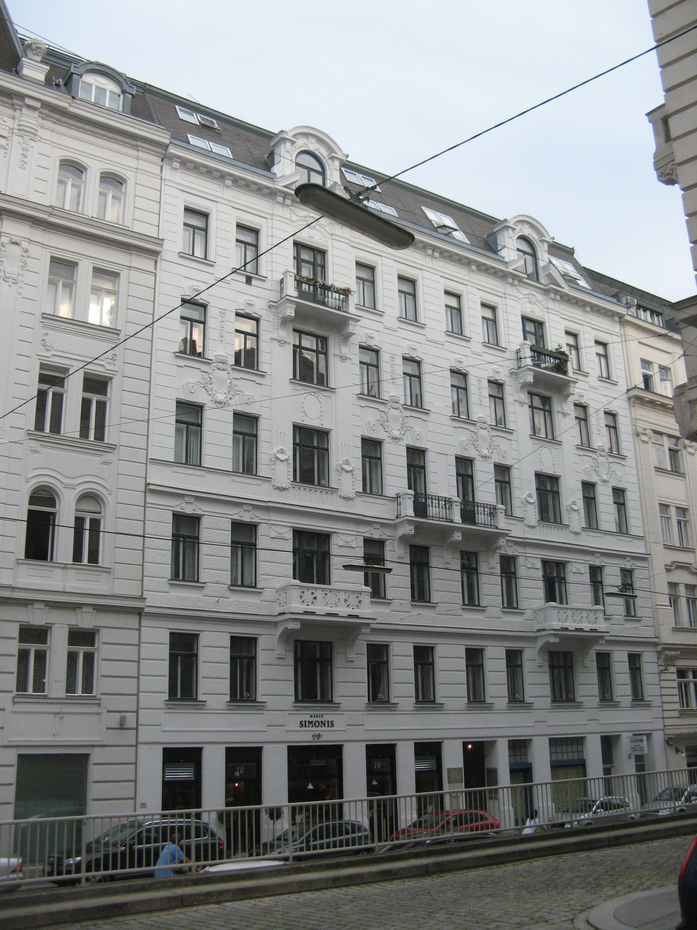 Dominikanerbastei Nr. 10 (1907) von Anton Hein, Wien-Innere Stadt